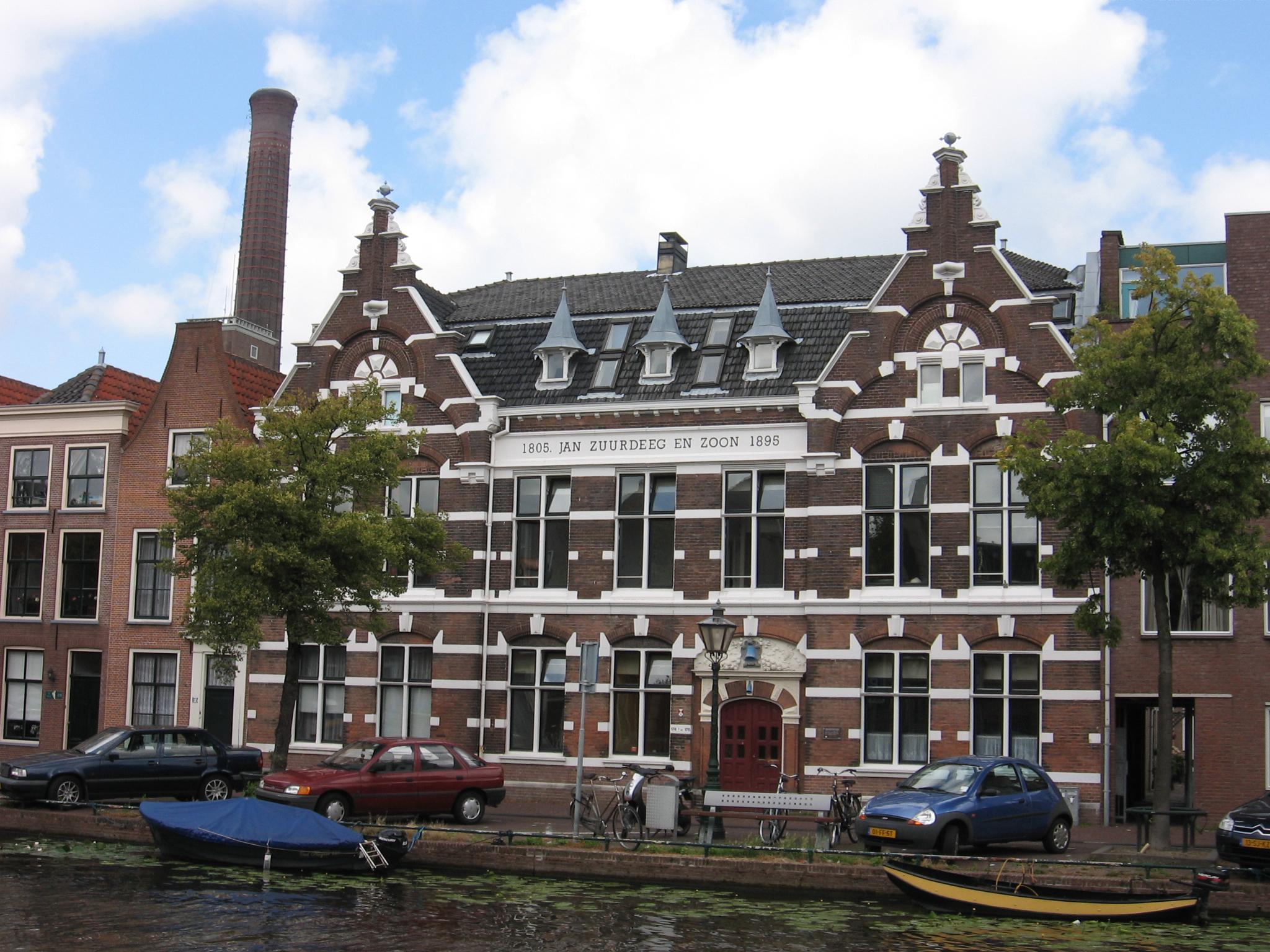 Zuurdeeg Leiden , Fa. Jan Dekenfabriek Oude Singel 174-182 1805 1933 V/h De Blauwe Klok uit 1680, 1896 nieuwbouw